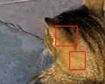 Creació de blocs a la imatge a causa de la incorrecte codificació i estimació de moviment.